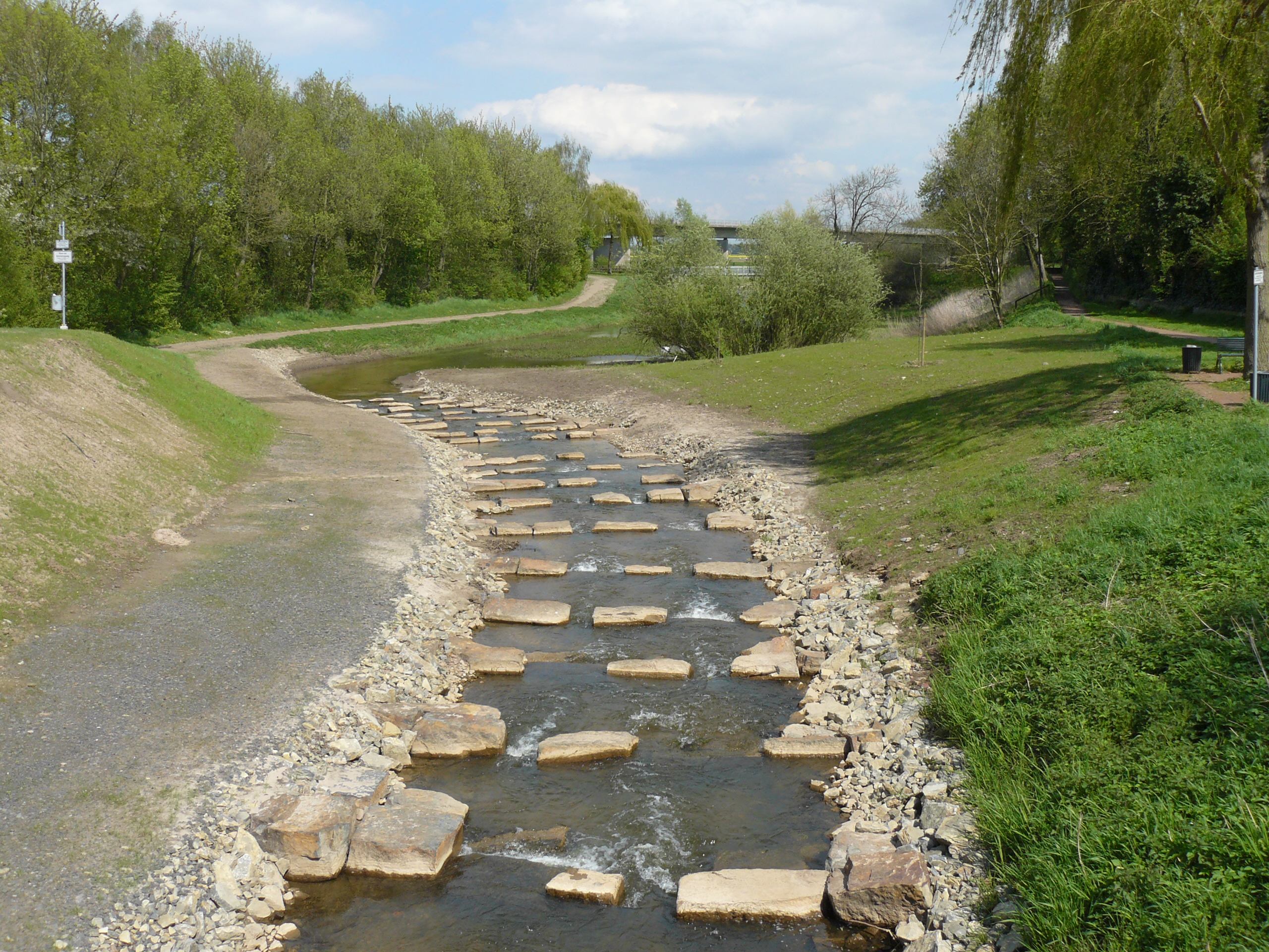 Ösper in Petershagen kurz vor der Mündung in die Weser: Der hohe Sohlabsturz im Hafen wurde 2014 durch eine Sohlgleite ersetzt.